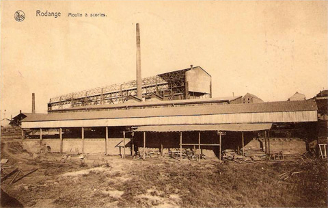 Carte postale avec le moulin à scories de Rodange.